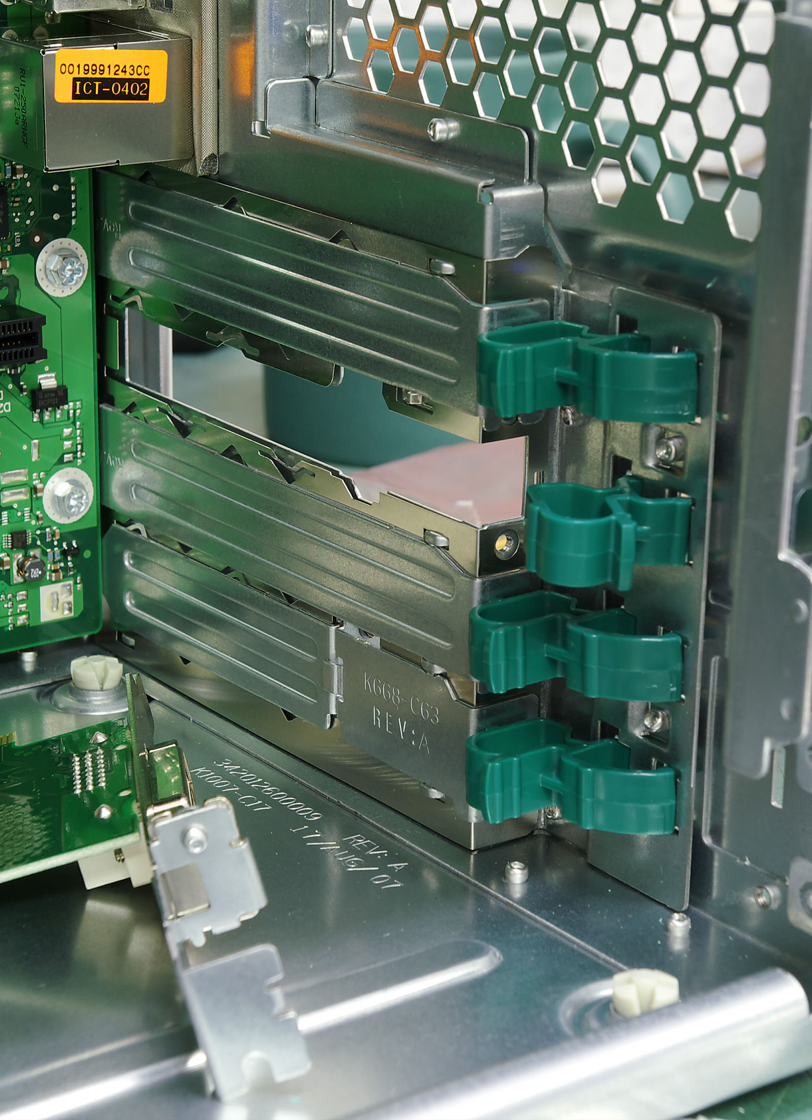 Clipbefestigung für Zusatzkarten in Personalcomputern. (BTX-Gehäuse)